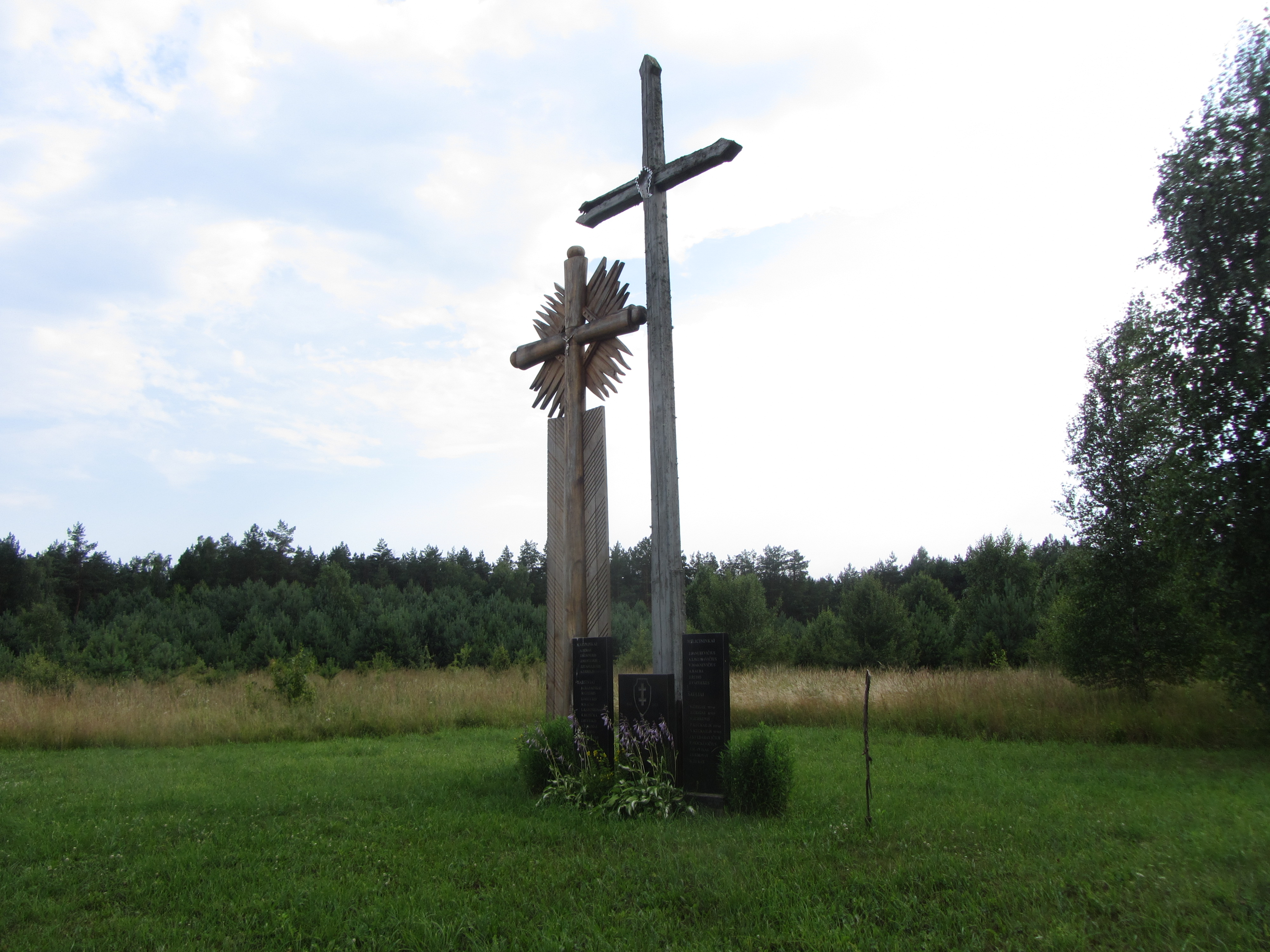 Leipalingio sen., Lithuania